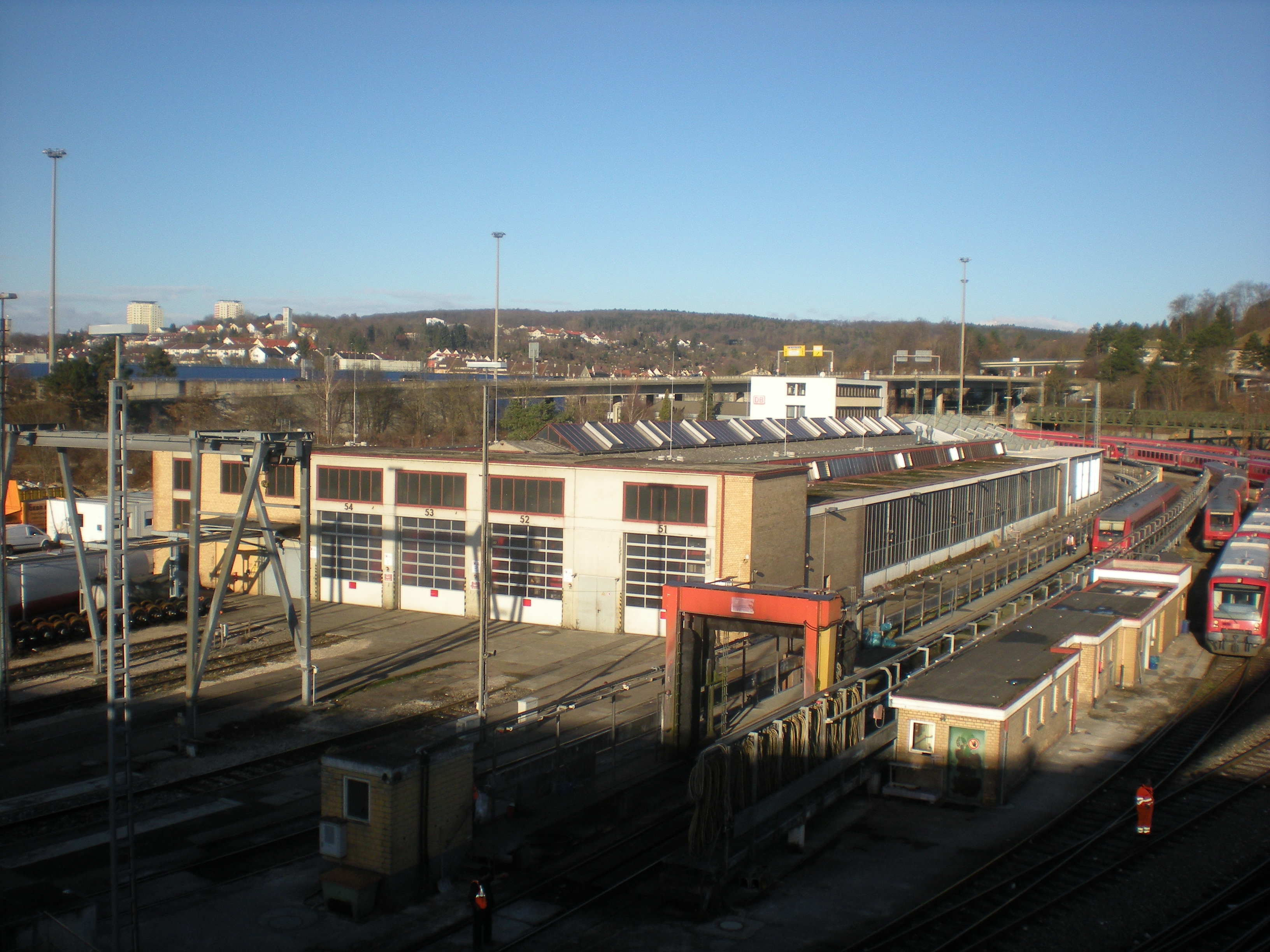 Wagenwerk des Bahnbetriebswerks Ulm Hbf, rechts abgestellte Triebwagen der Baureihen 611, 628 und 650